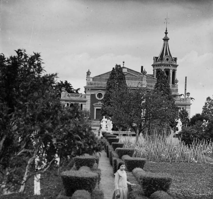 Vista general dels jardins de Martí-Codolar. Josep Salvany i Blanch (1914)